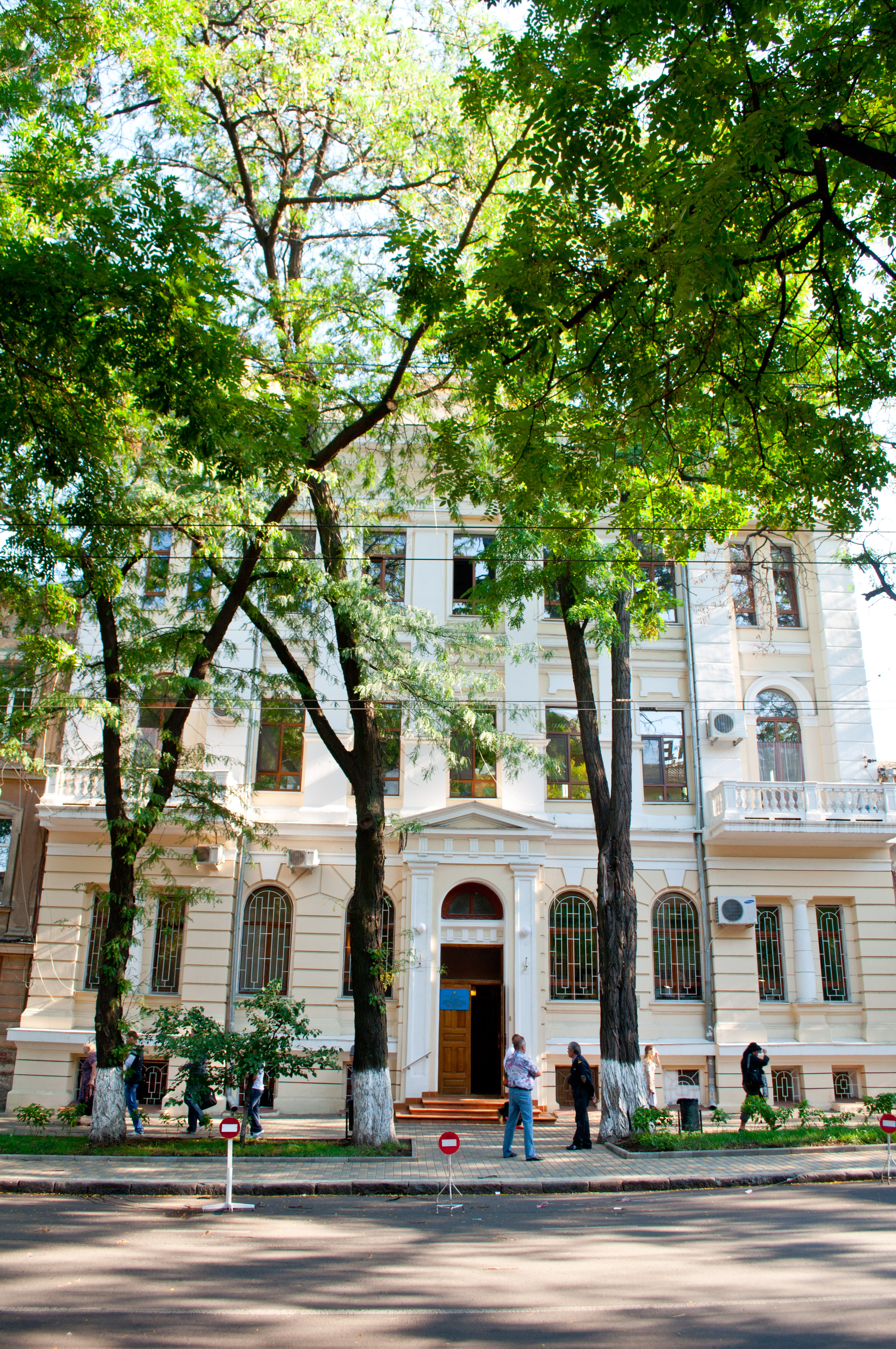 Будівля учбова Вищих жіночих курсів, у якому проходило засідання пленуму Ради робітничих депутатів м. Одеси.